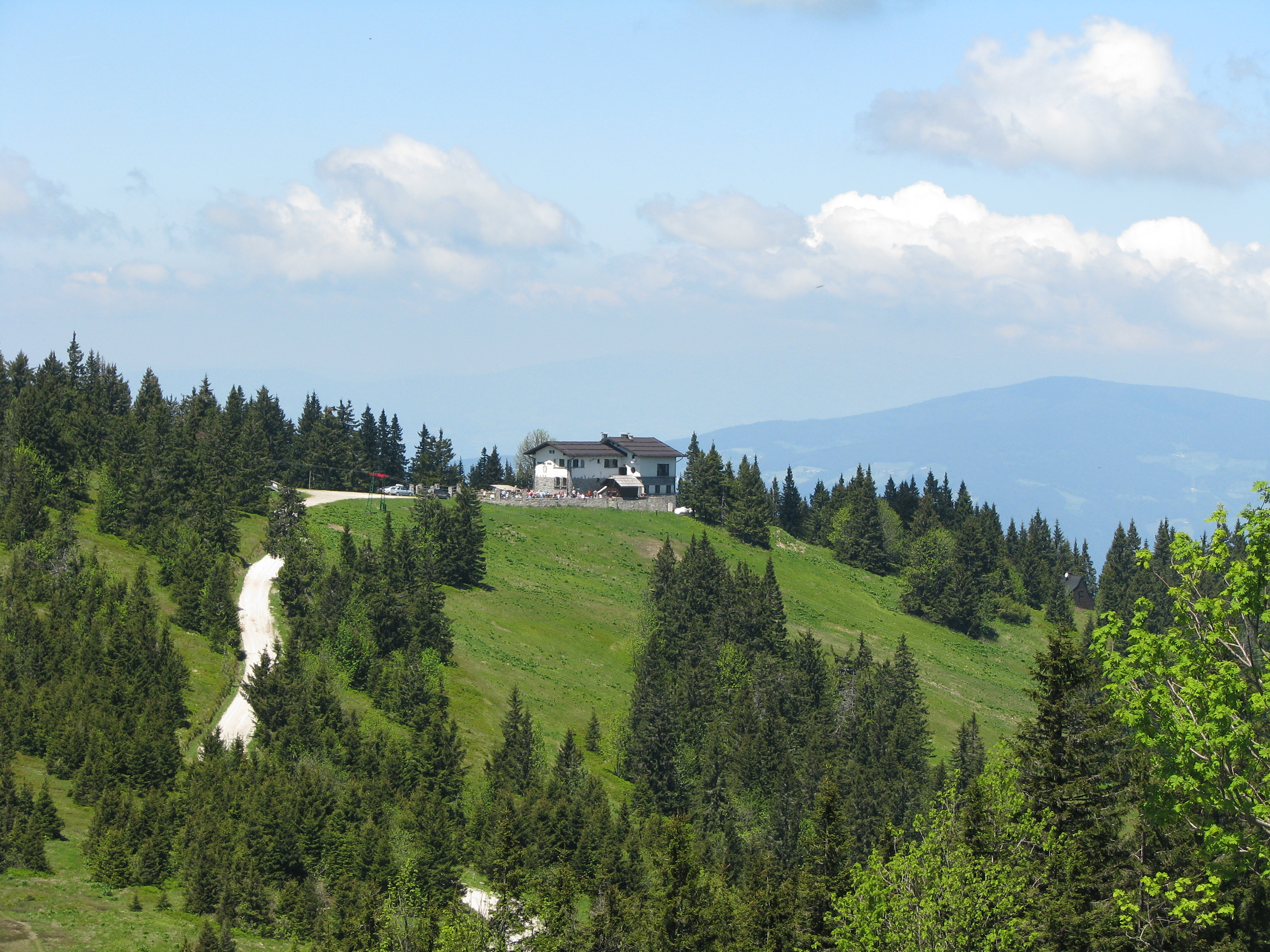 Ribniška koča v Hudem Kotu, najvišje ležeča koča na Pohorju (1530 m).